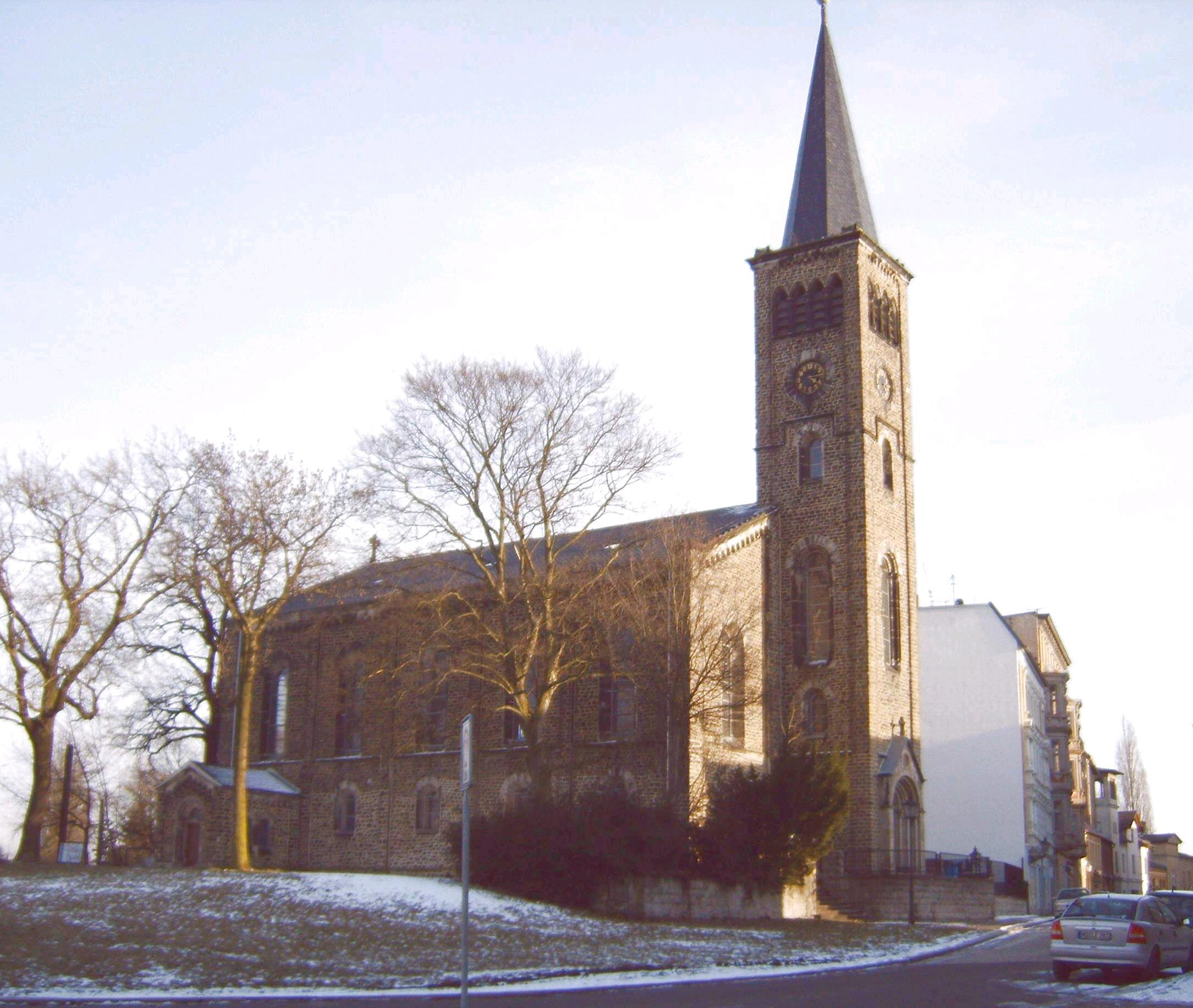 evangelische Kirche in Magdeburg-Buckau Bild aufgenommen am 27.2.2006